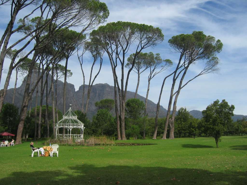 Picknickwiese des Weinguts Boschendal